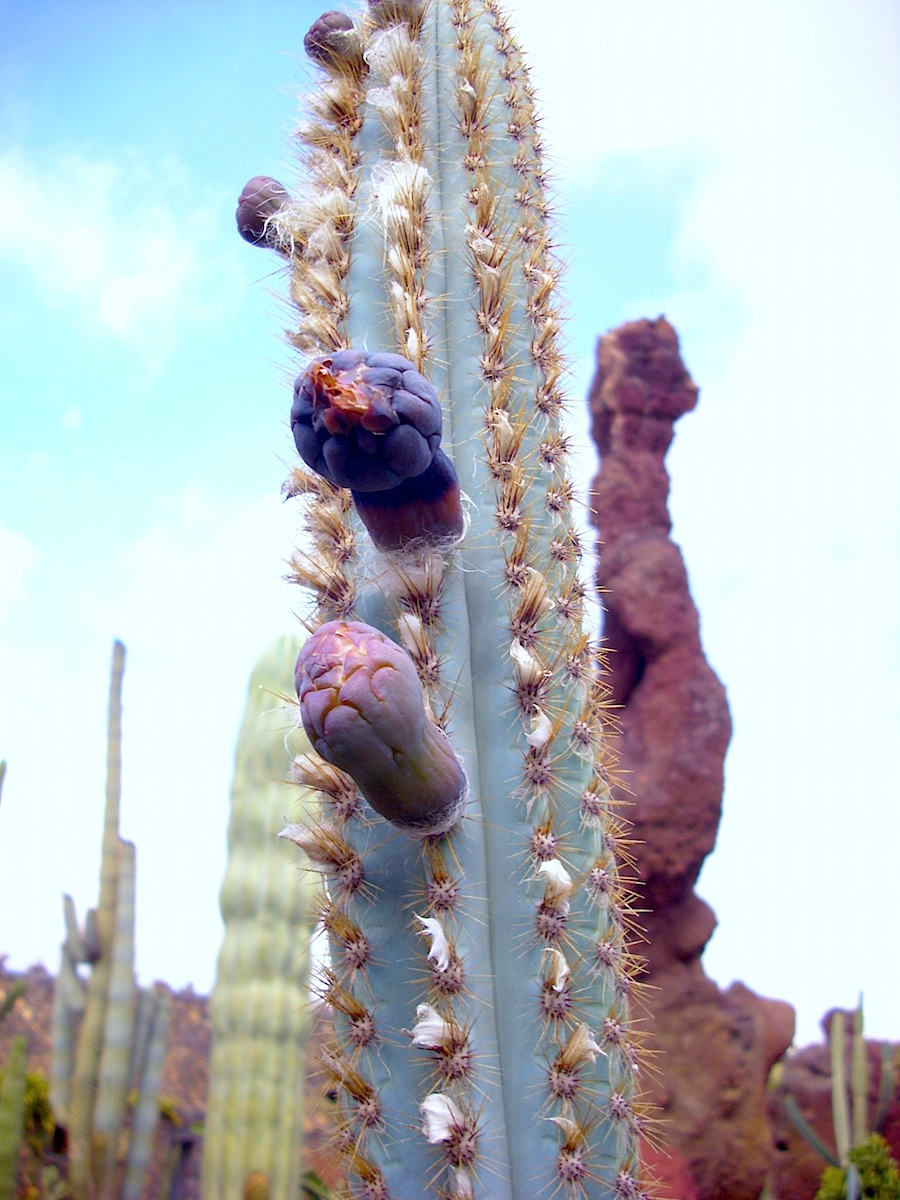 Pilosocereus azulensis